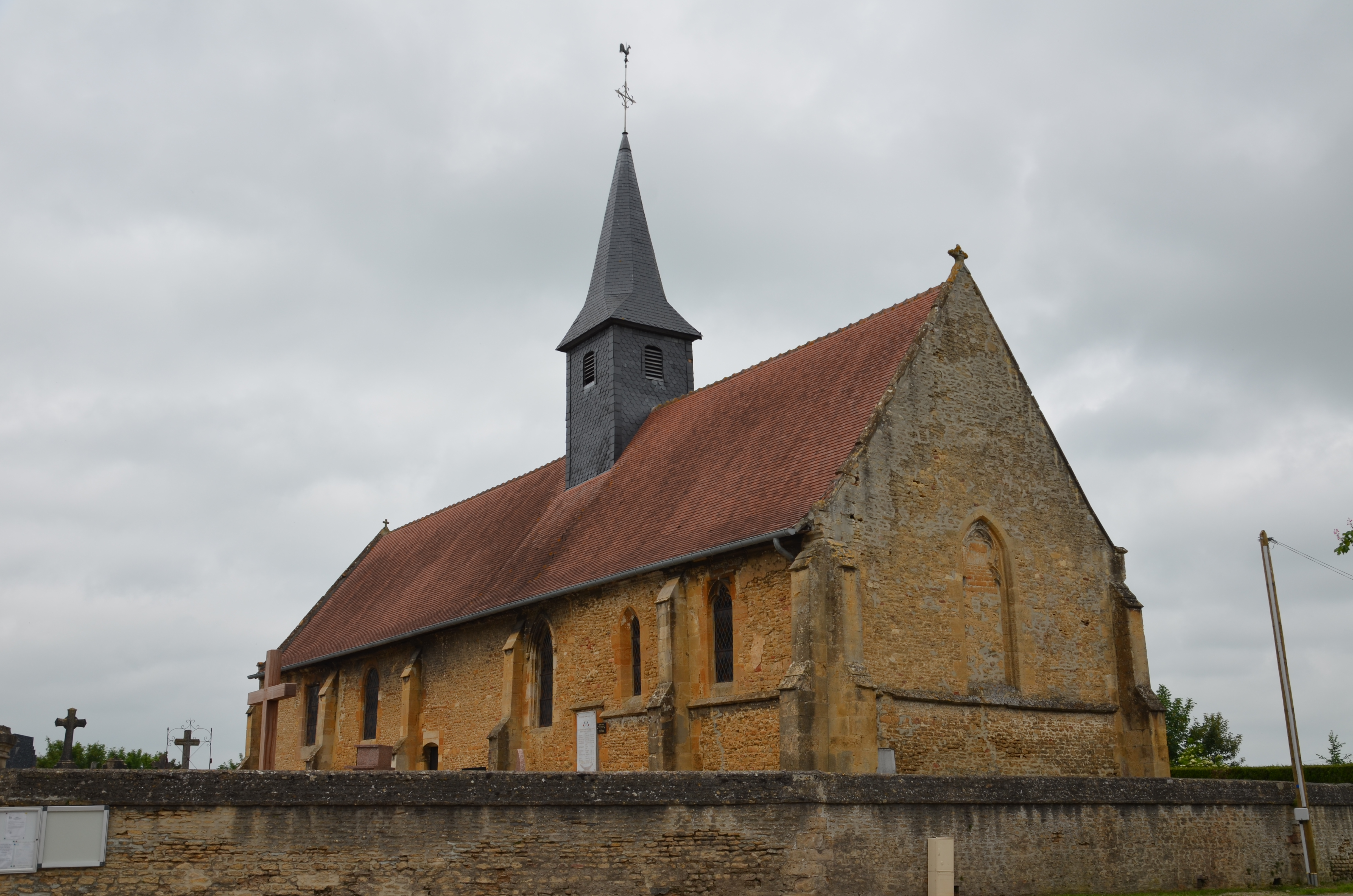 Église Saint-Martin de Bretteville-sur-Dives.